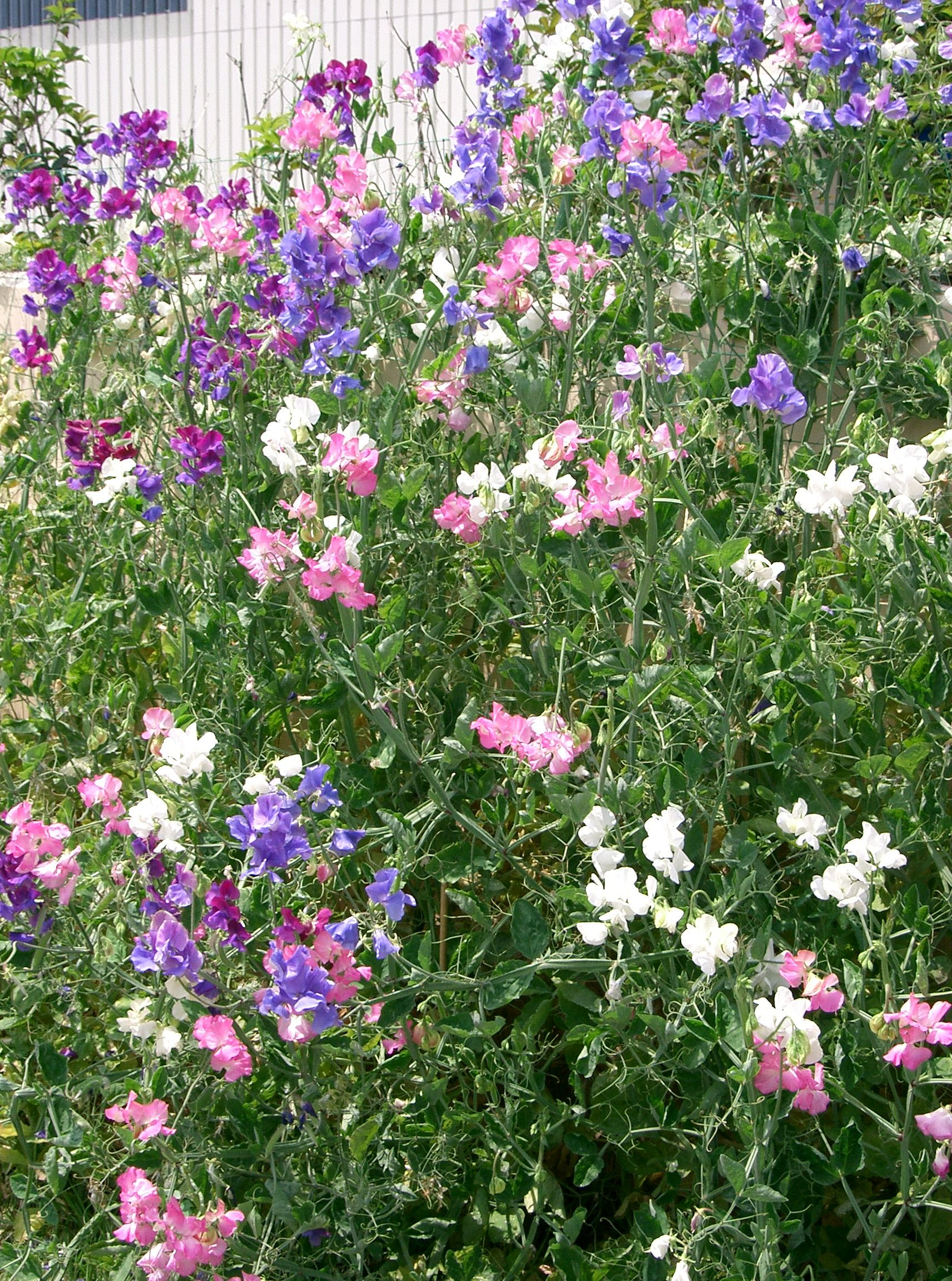 Lathyrus odoratus